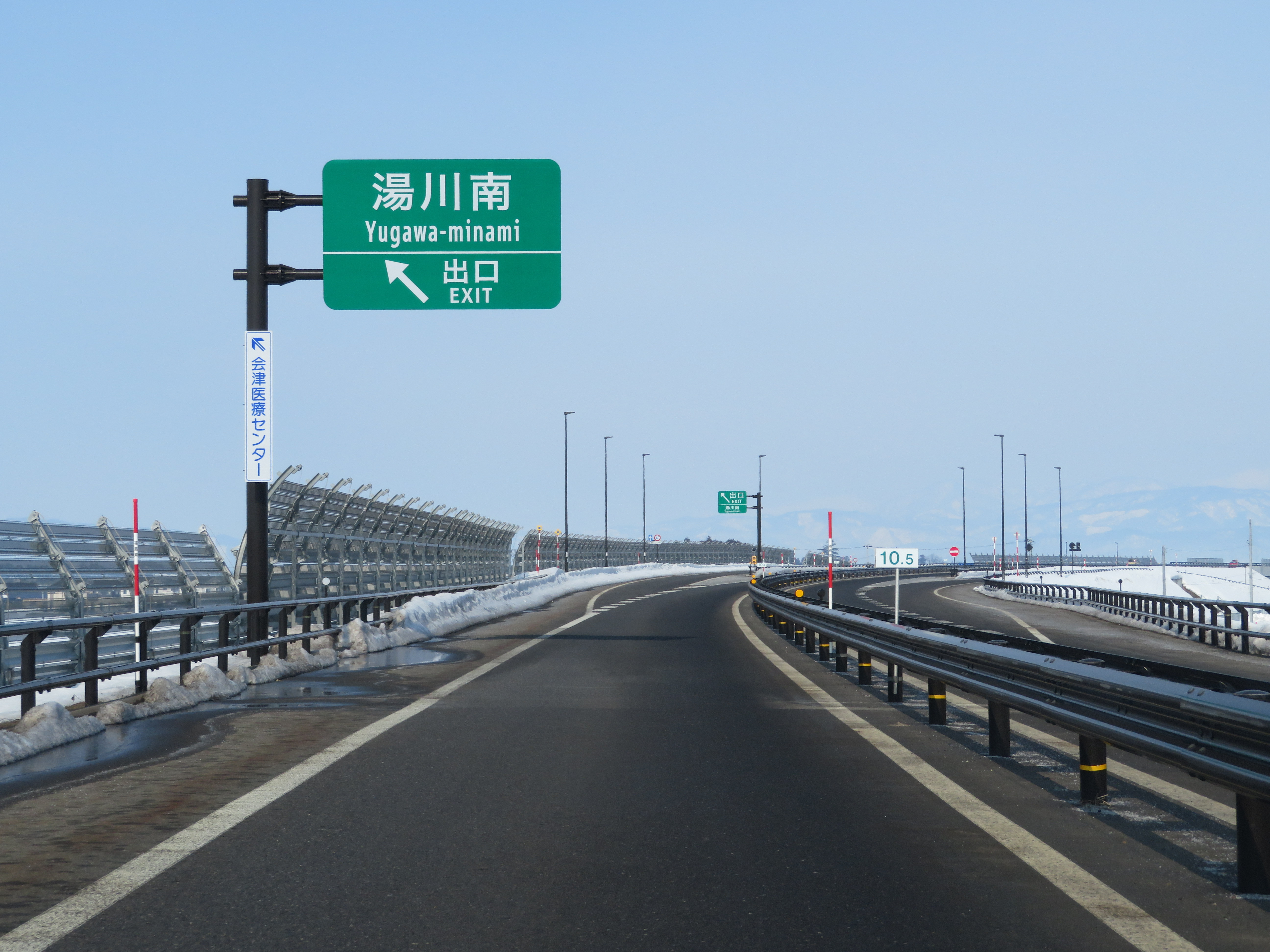 国道121号会津縦貫北道路 湯川南インターチェンジ 出口付近（会津若松方面側から撮影）